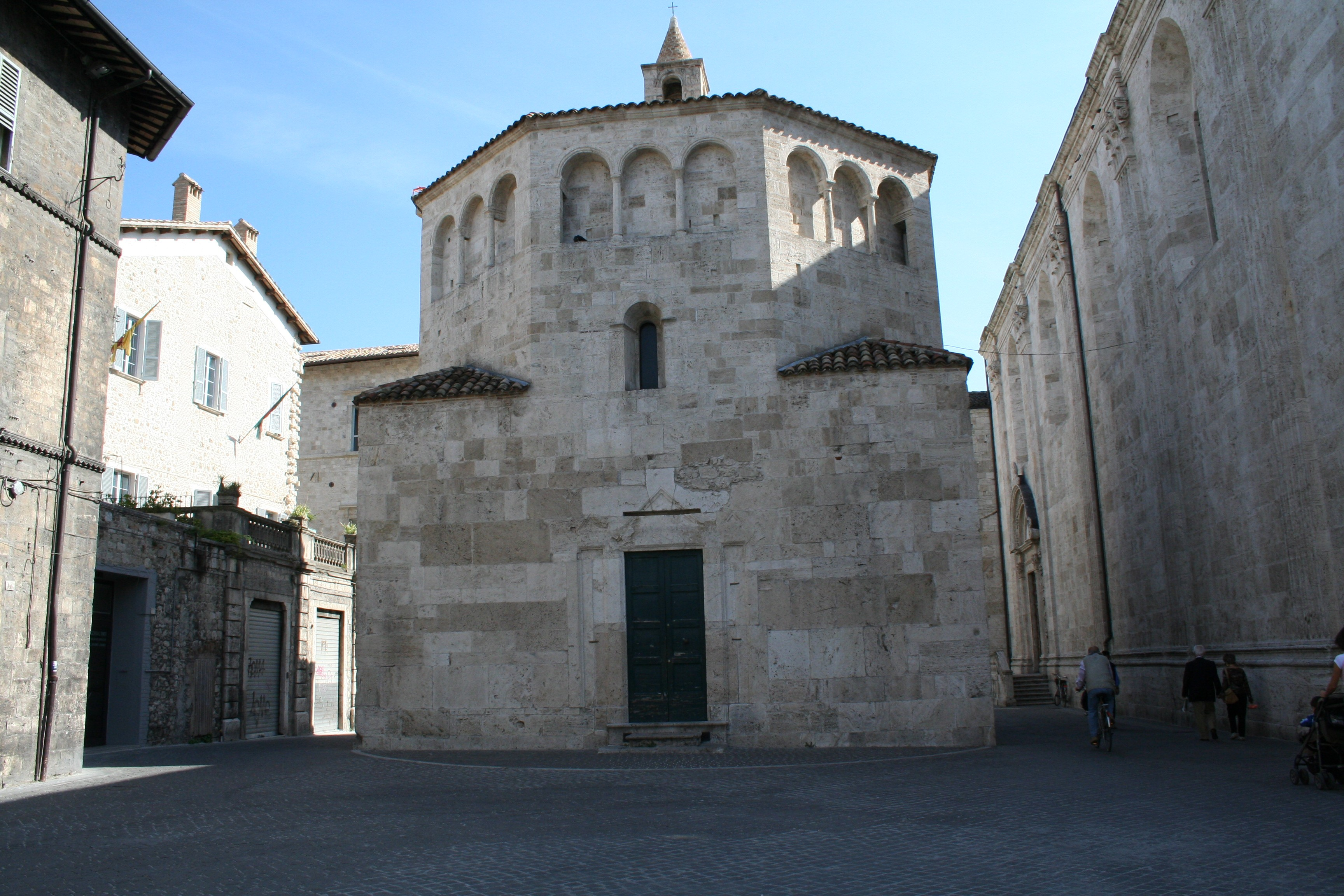 DescriptionBattistero San Giovanni, ottobre 2006 Sourceproprio scatto Date2006-10-01 AuthorSibilla.io Permission"Utilizzo concesso" This file is licensed under Creative Commons Attribution 2.5 License